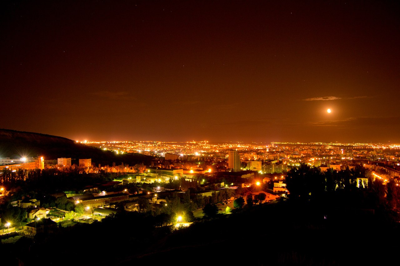 г. Саратов, Октябрьское ущелье, ул. Клиническая